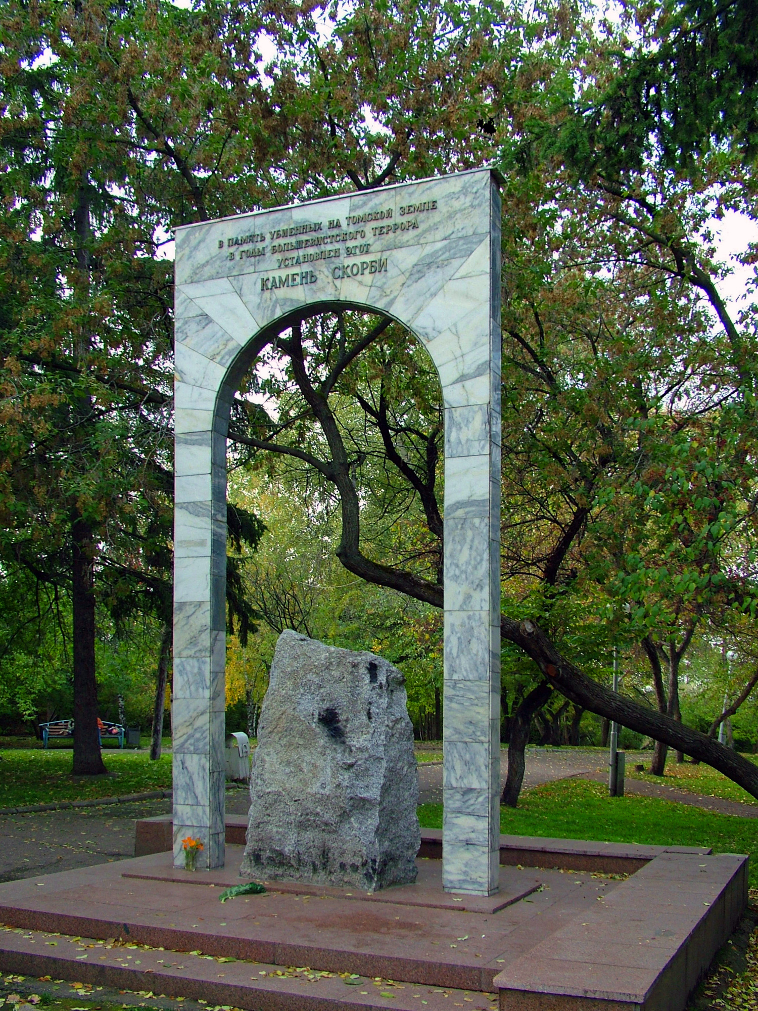 Камень скорби в память убиенным на томской земле в годы большевистского террора.